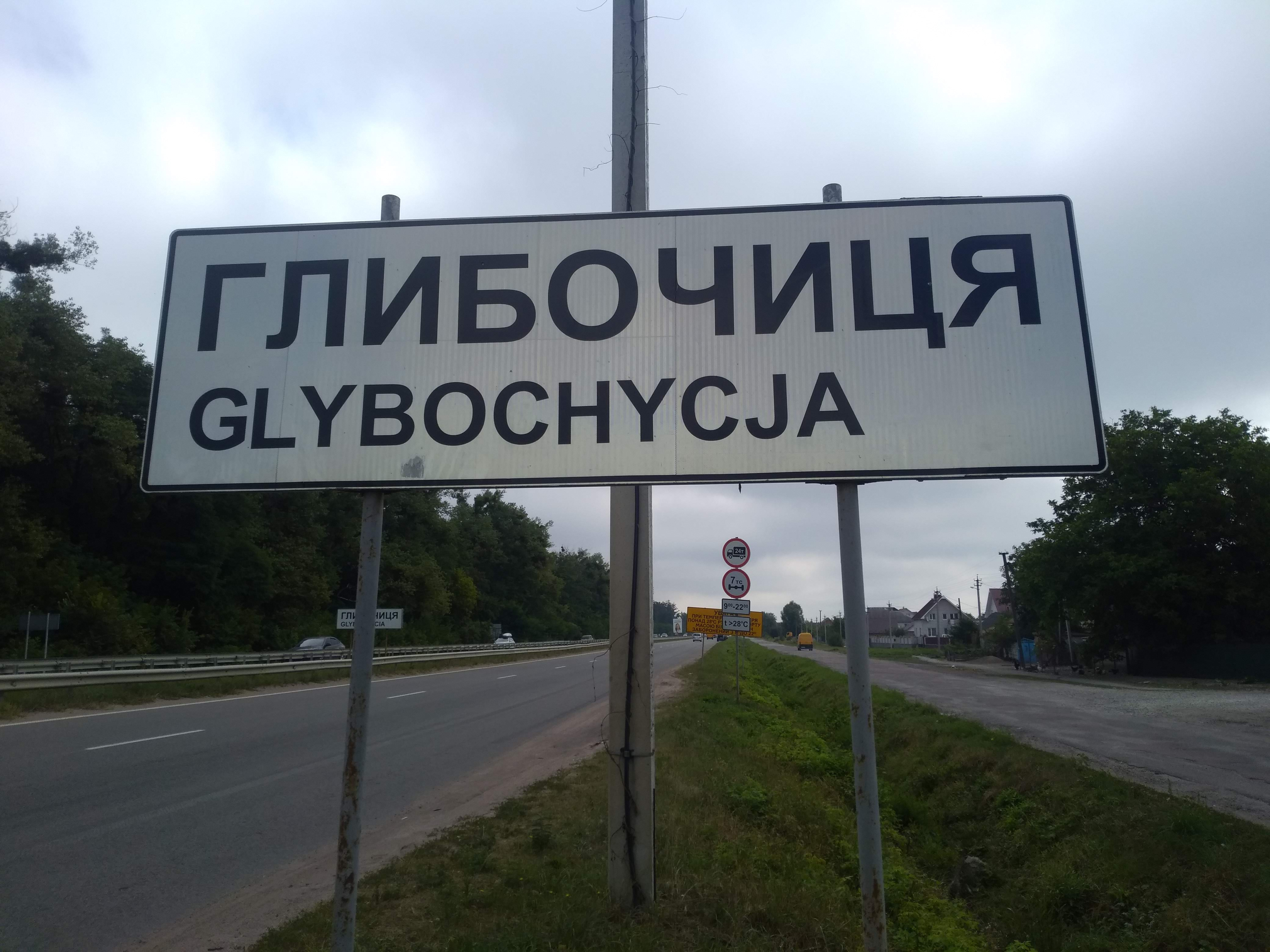 Вказівний знак на в'їзді до села Глибочиця з боку Житомира